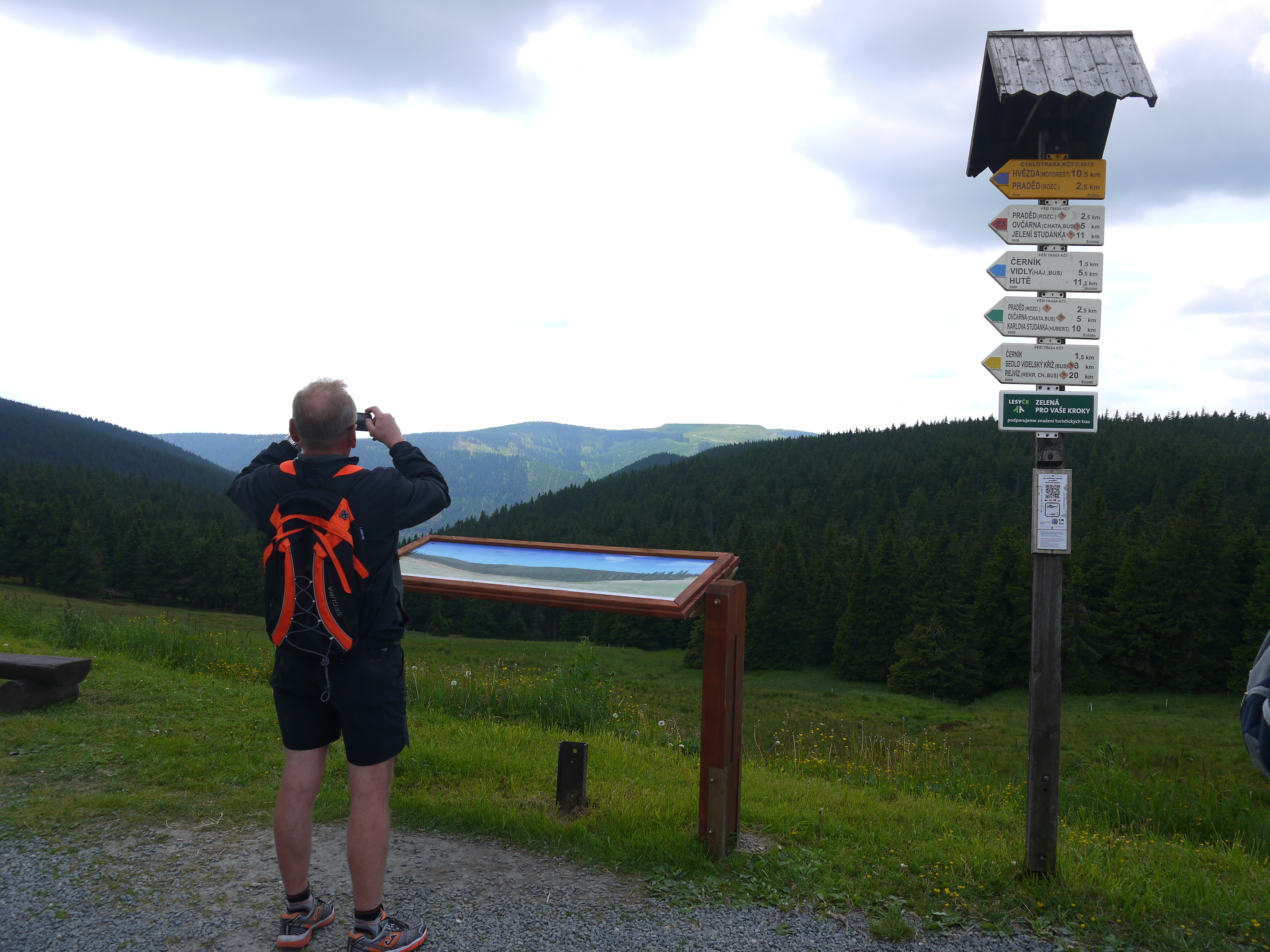 Schronisko Svycarna